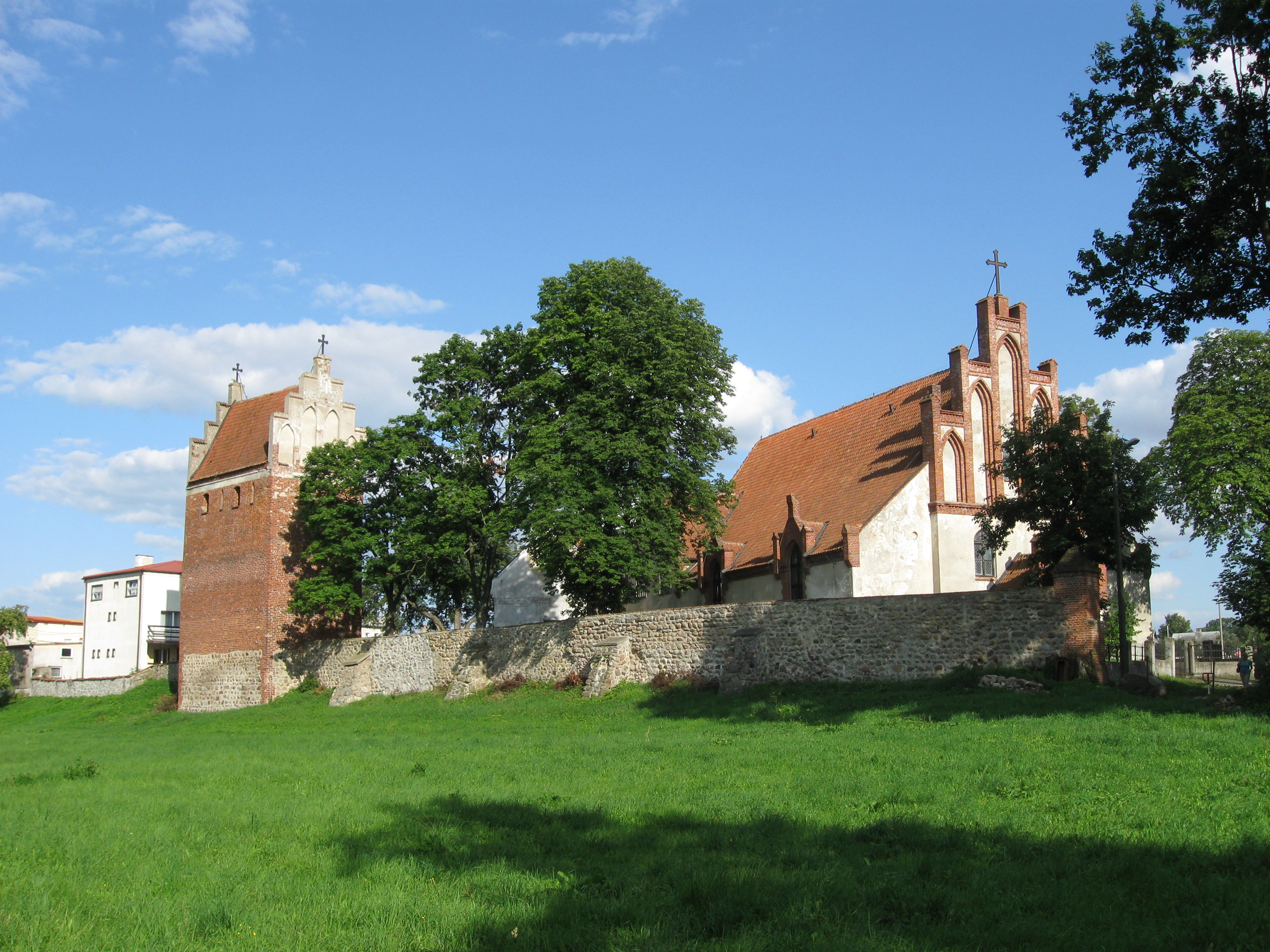 Dąbrówno - dawny kościół ewangelicko-augsburski, obecnie metodystów, z dzwonnicą i przyległymi murami obronnymi, 1601, 1724, 1842-1896